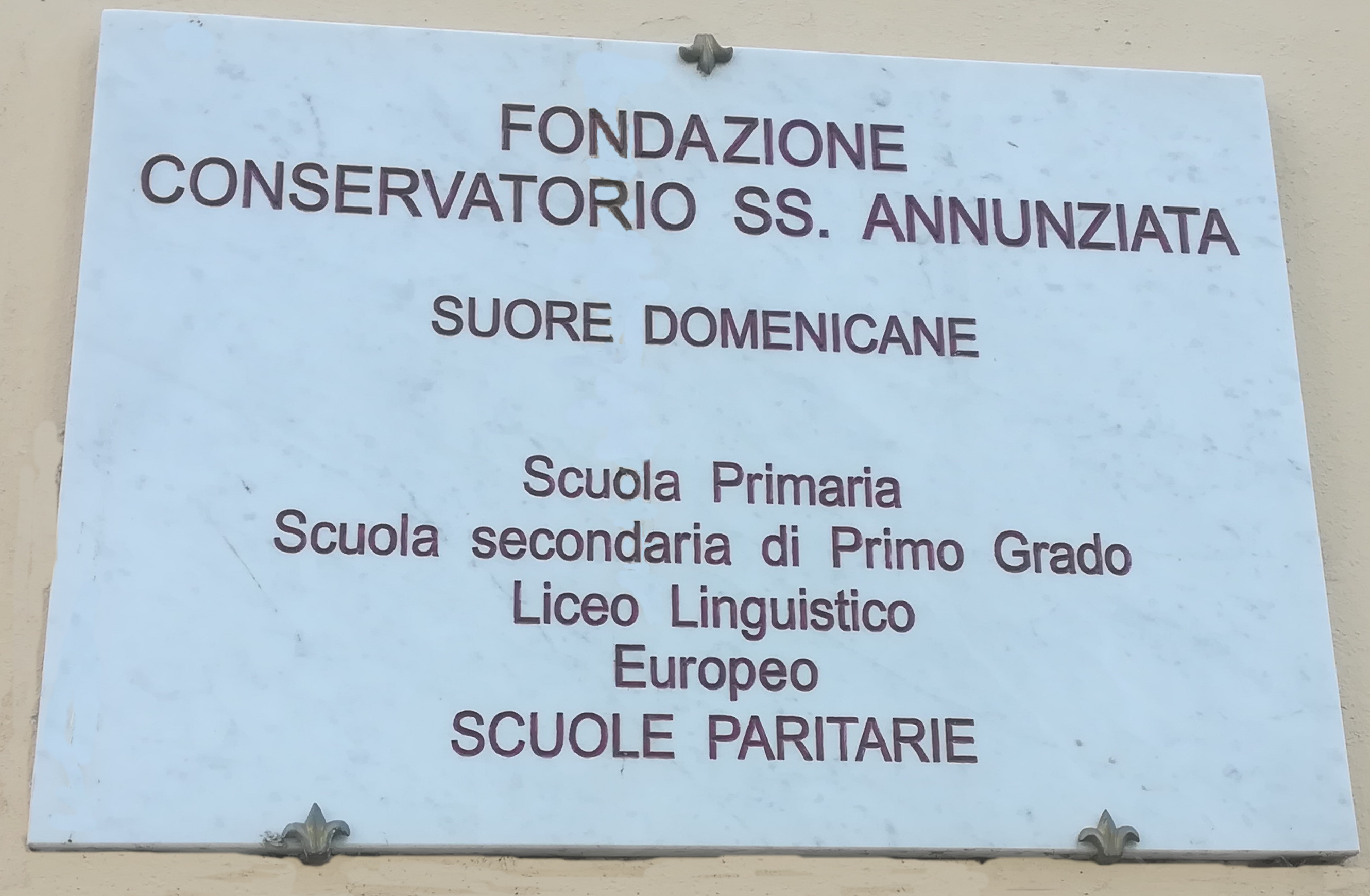 L'entrata della scuola in Piazza Matteotti (Empoli)